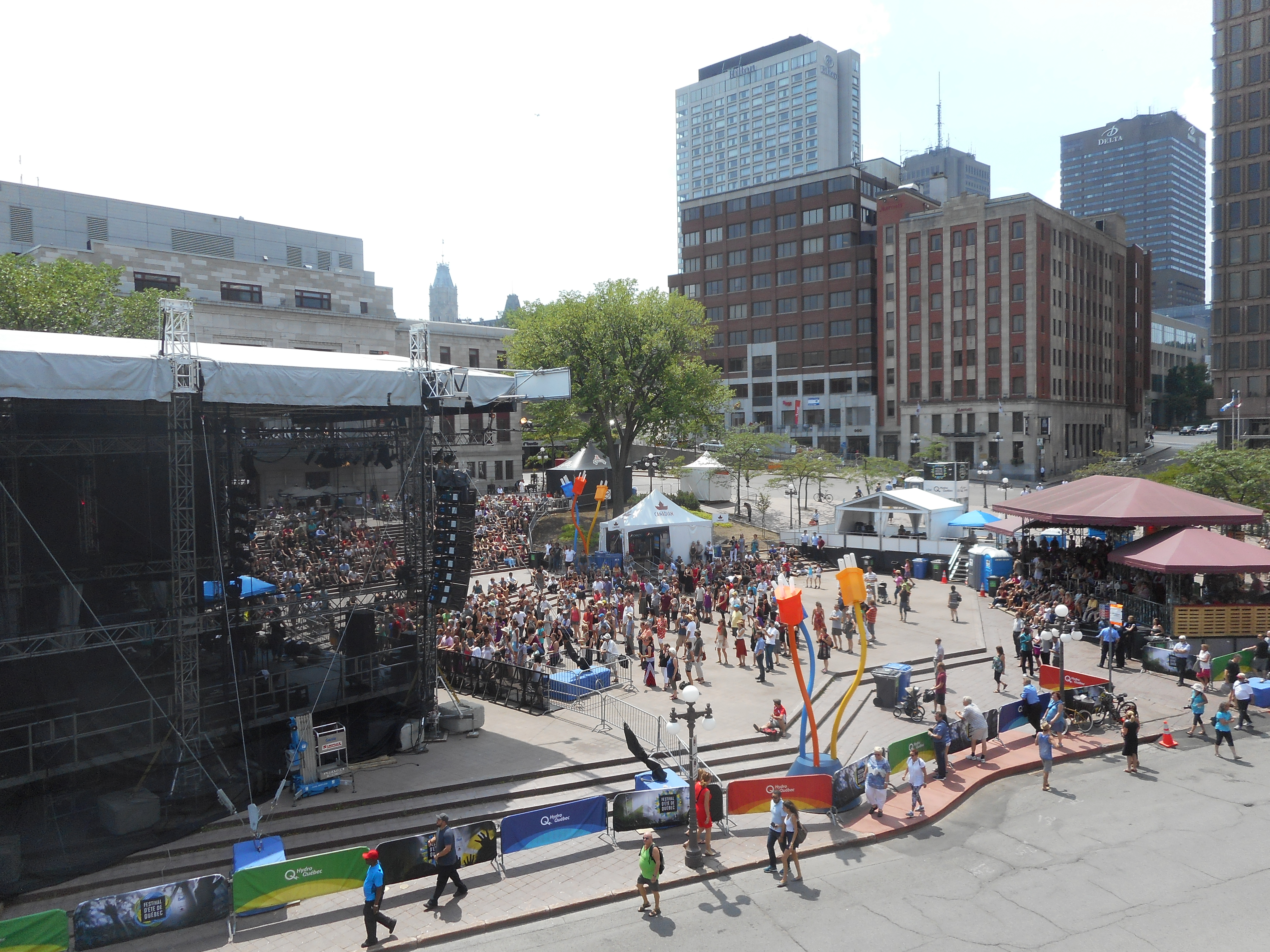 Le festival d'été de Québec, place D'Youville